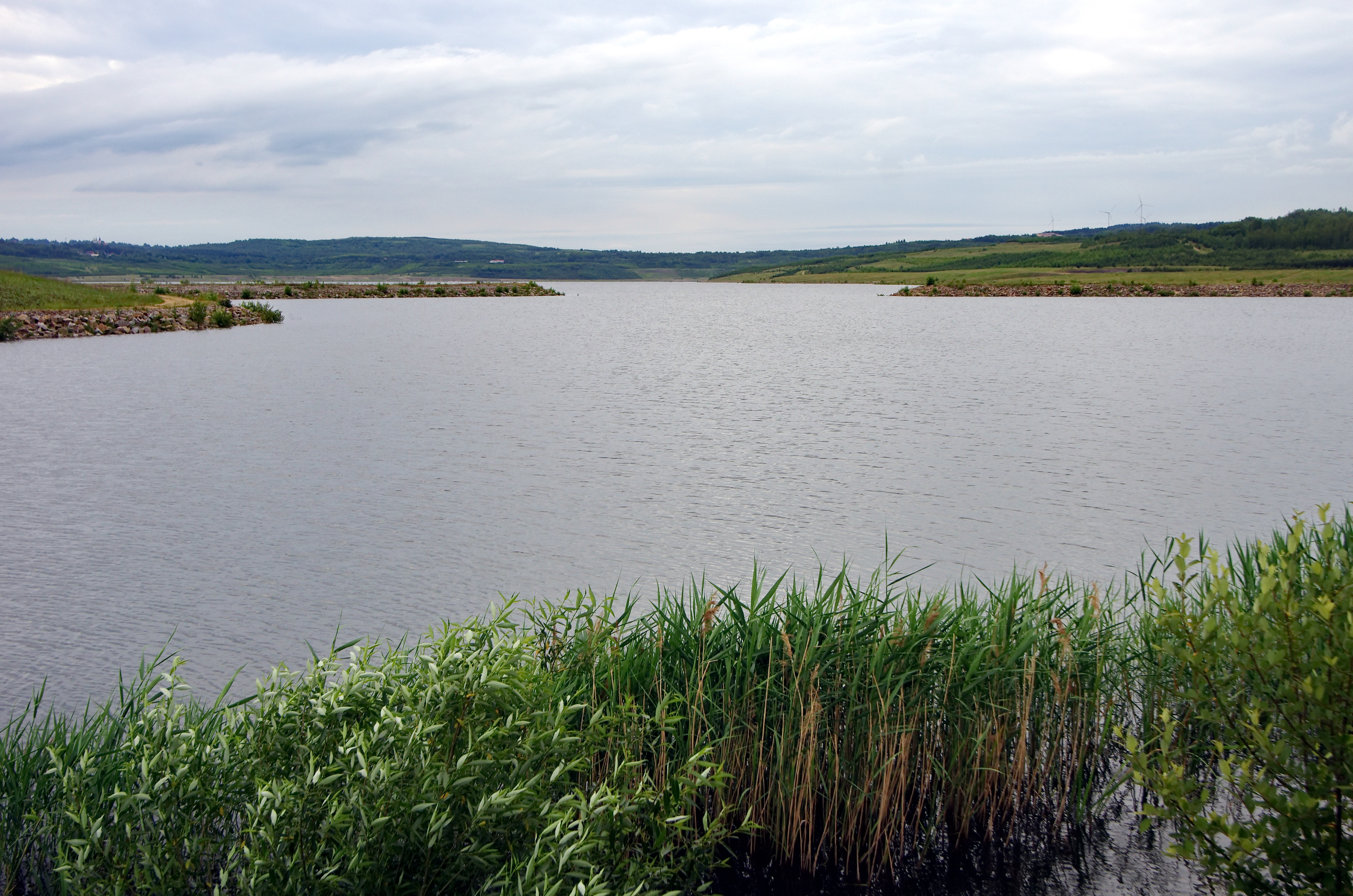 Jezero Medard v Sokolovské pánvi